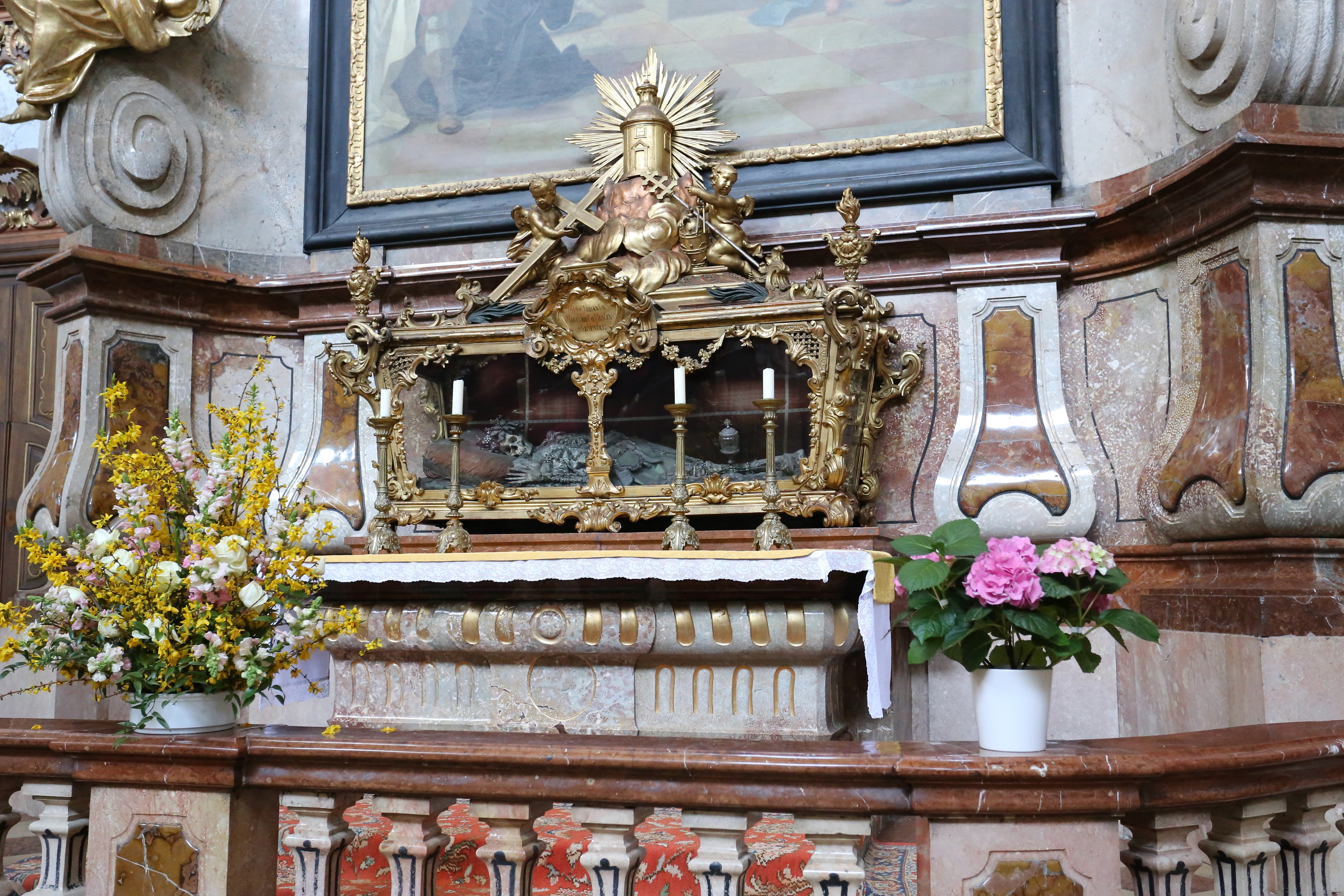 Reliquienschrein in der Stiftskirche der niederösterreichischen Stadt Herzogenburg. In dem kunstvollen Holzschrein beim Augustinusaltar befinden sich die Gebeine des hl. Urbanus, die im Jahre 1740 aus der Calixtus-Katakombe in Rom nach Herzogenburg übertragen wurden.